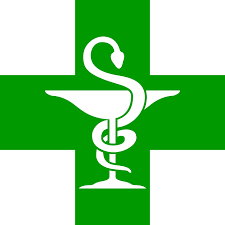 Sigla generală a farmaciilor.